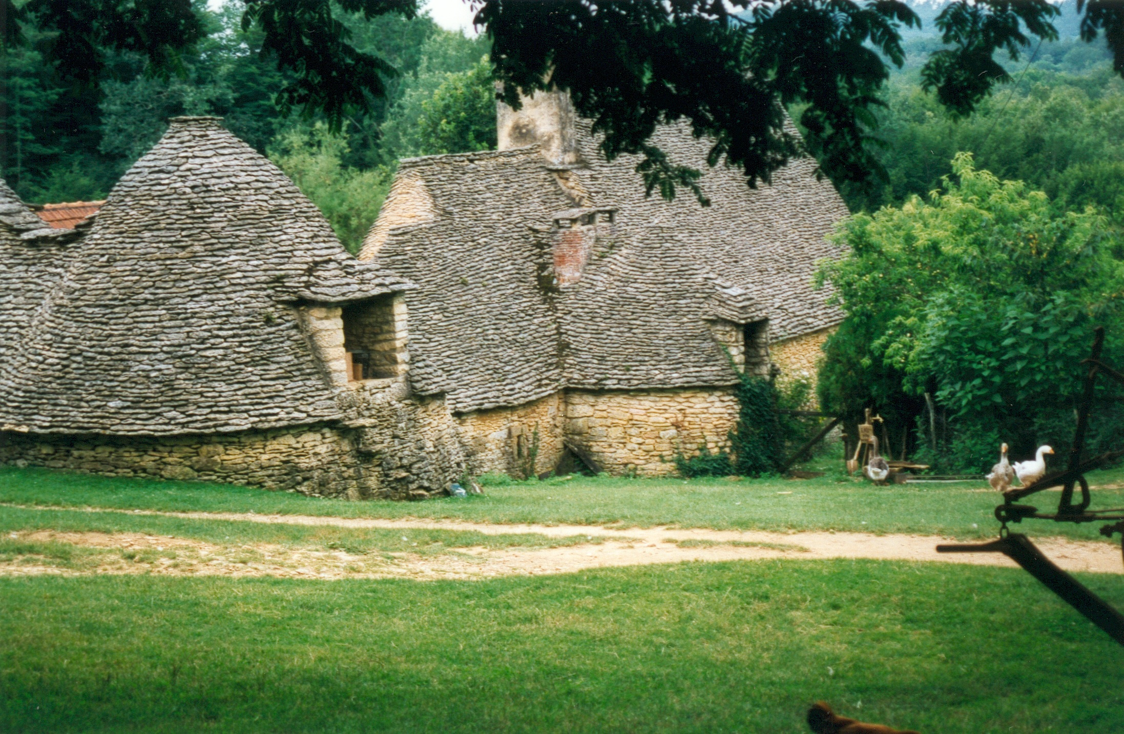 Les «Cabanes du Breuil» à Saint-André-d'Allas en Dordogne (France). La 3e cabane du premier groupe et les deux cabanes accolées à angle droit et adossées au fournil. Photographie prise par Patrick GIRAUD / The site known as "Cabanes du Breuil" at Saint-André-d'Allas, Dordogne (France). The 3rd hut of the first group, and the two huts set at right angles against the bake house.